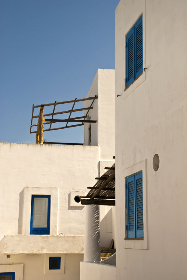 Isole Eolie - Panarea